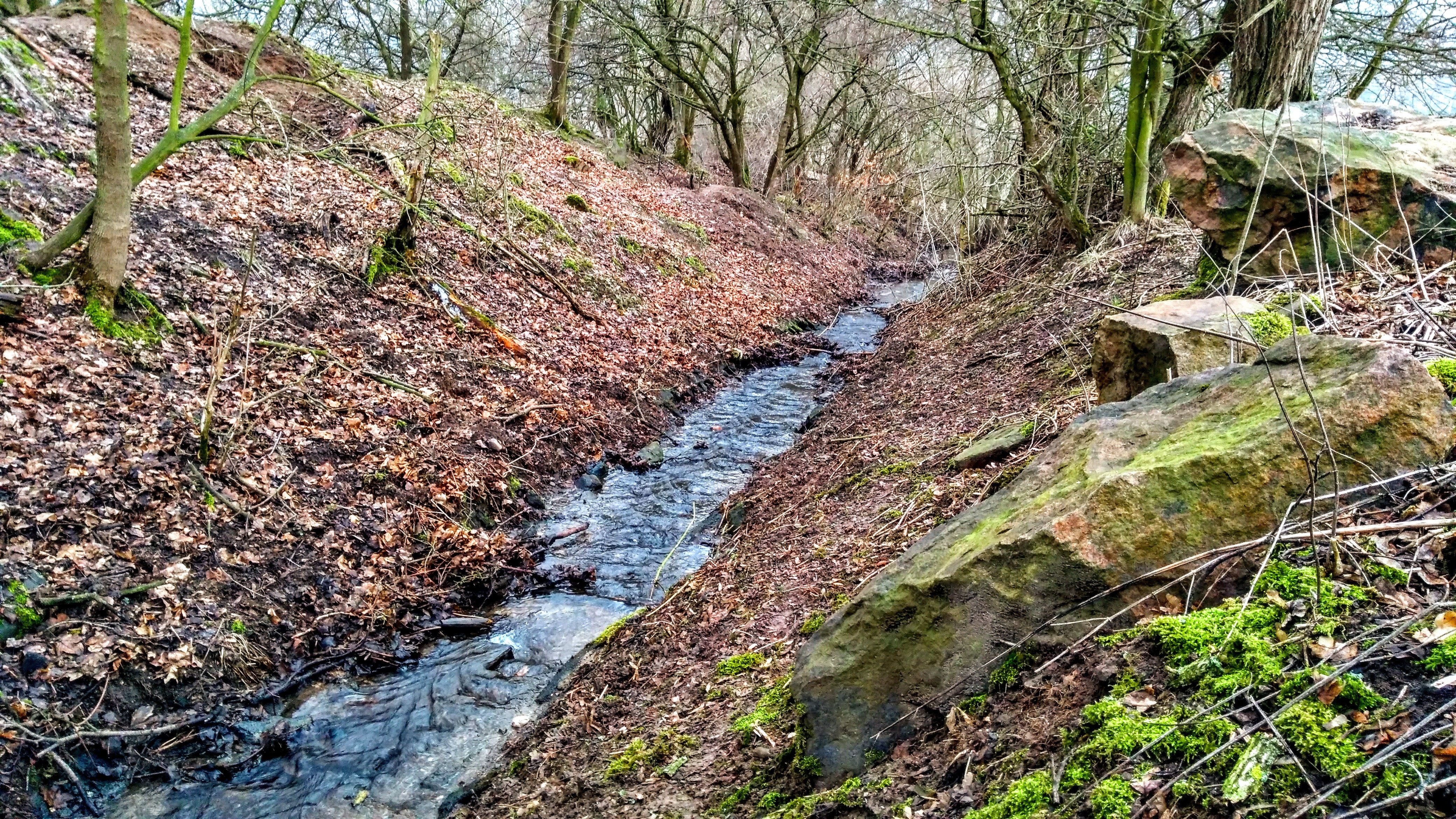 Martiněveský potok.